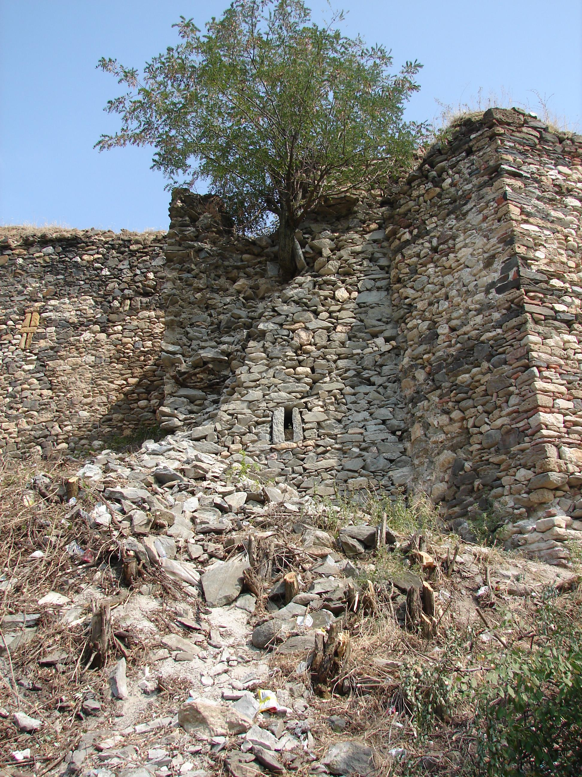 Kaljaja fortress above Prizren.